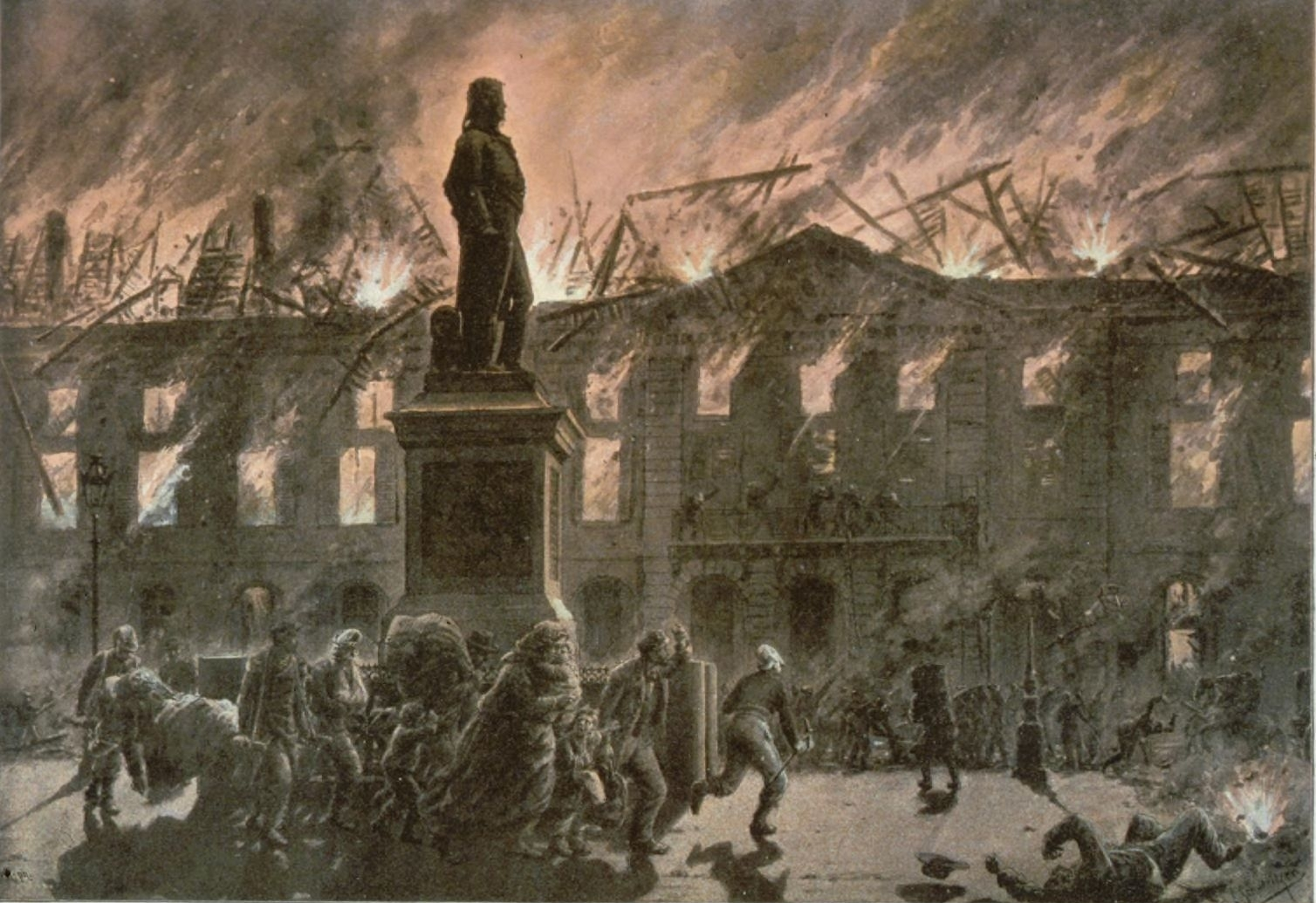 L'incendie de l'Aubette dans la nuit du 24 Août 1870. Emile Schweitzer, éd. 1897. Bibliothèque nationale et universitaire de Strasbourg